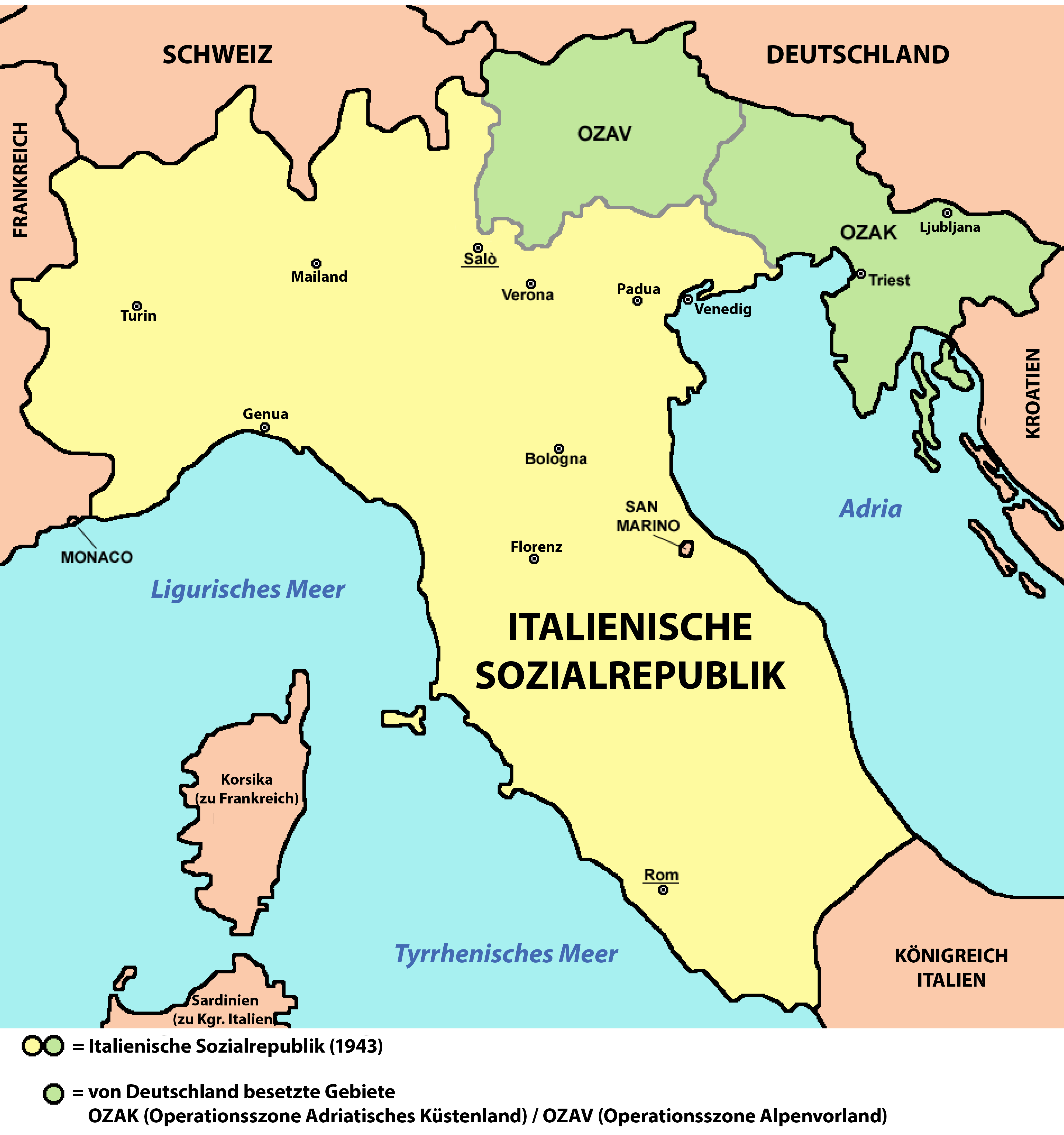 Karte der Italienischen Sozialrepublik (1943)